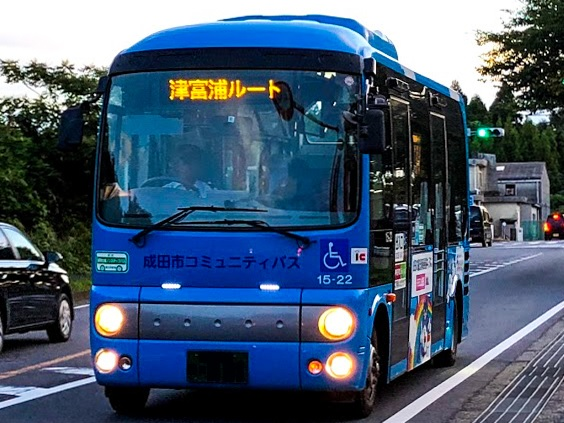 成田市コミュニティバス